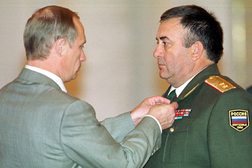 МОСКВА, КРЕМЛЬ. Церемония вручения государственных наград. Звание Героя России присвоено генерал-майору Мухридину Ашурову.